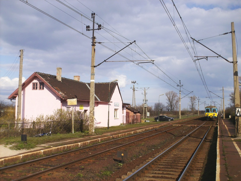 Stacja kolejowa (przystanek osobowy) w Jaśkowicach Legnickich